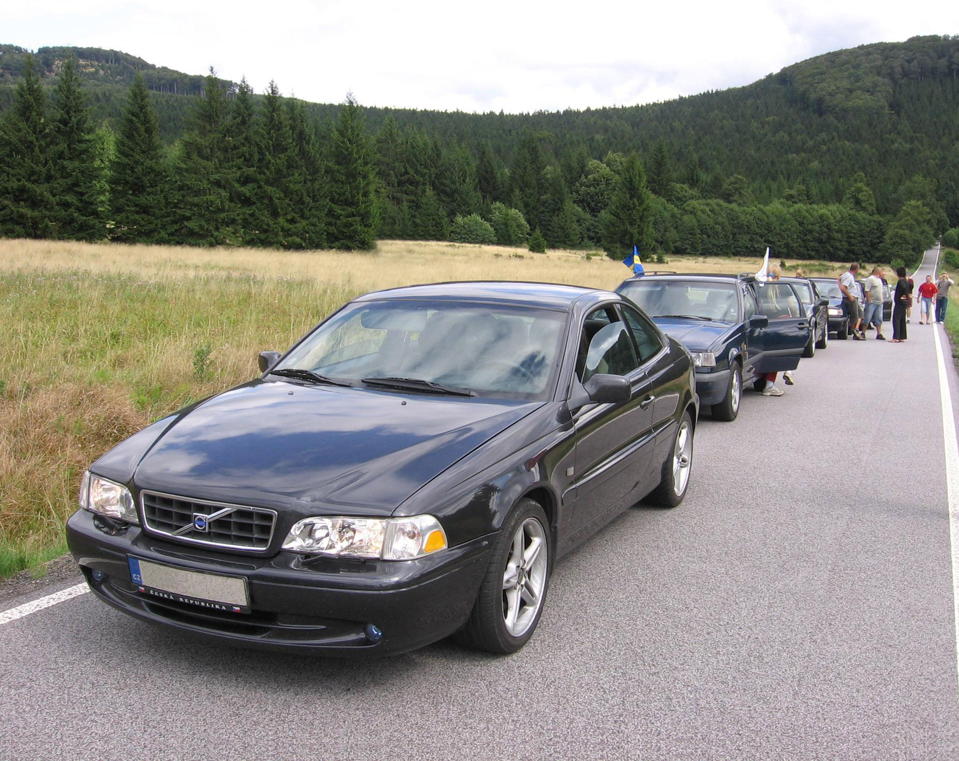 Volvo C70 T5, 1999